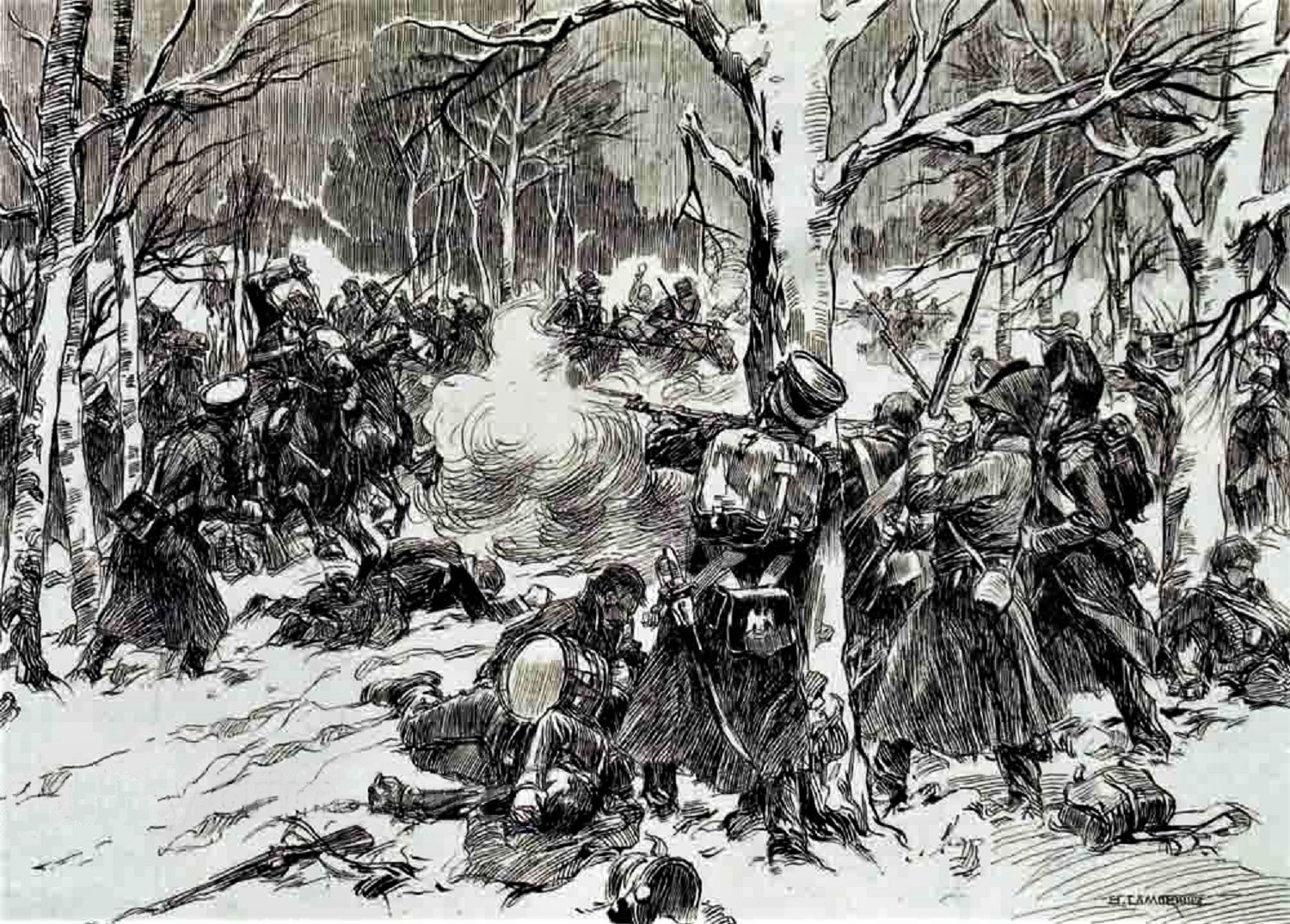 Николай Самокиш. Бой под Красным 3-го ноября 1812 года. Гравюра с оригинала. Собрание харьковского художественного музея